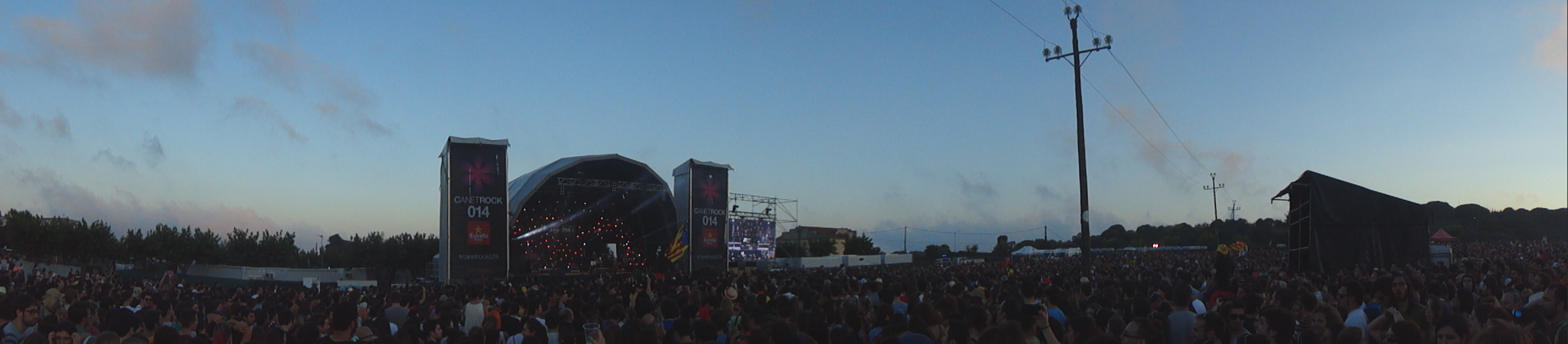 panoràmica del Canet Rock 2014